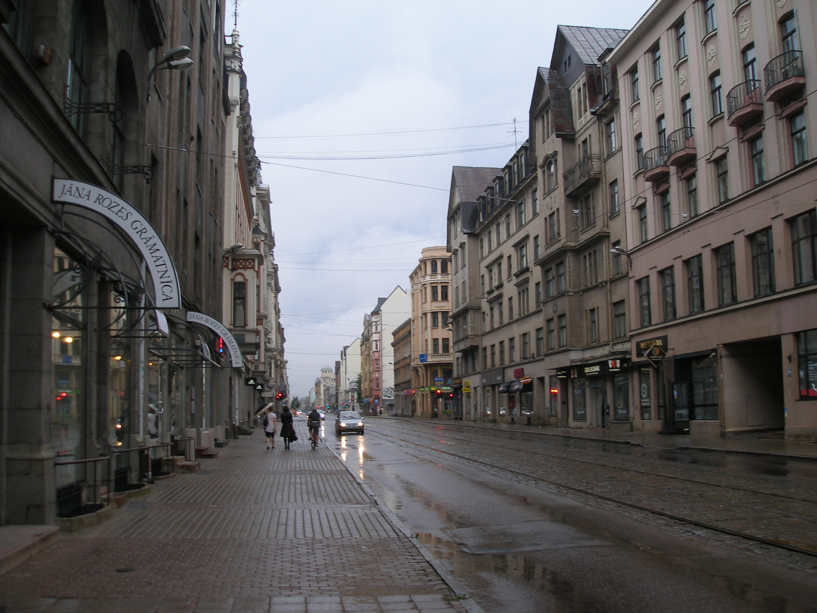 Вулиця Кріш'яня Барона в Ризі. Сфотографована 18 липня 2010 року.